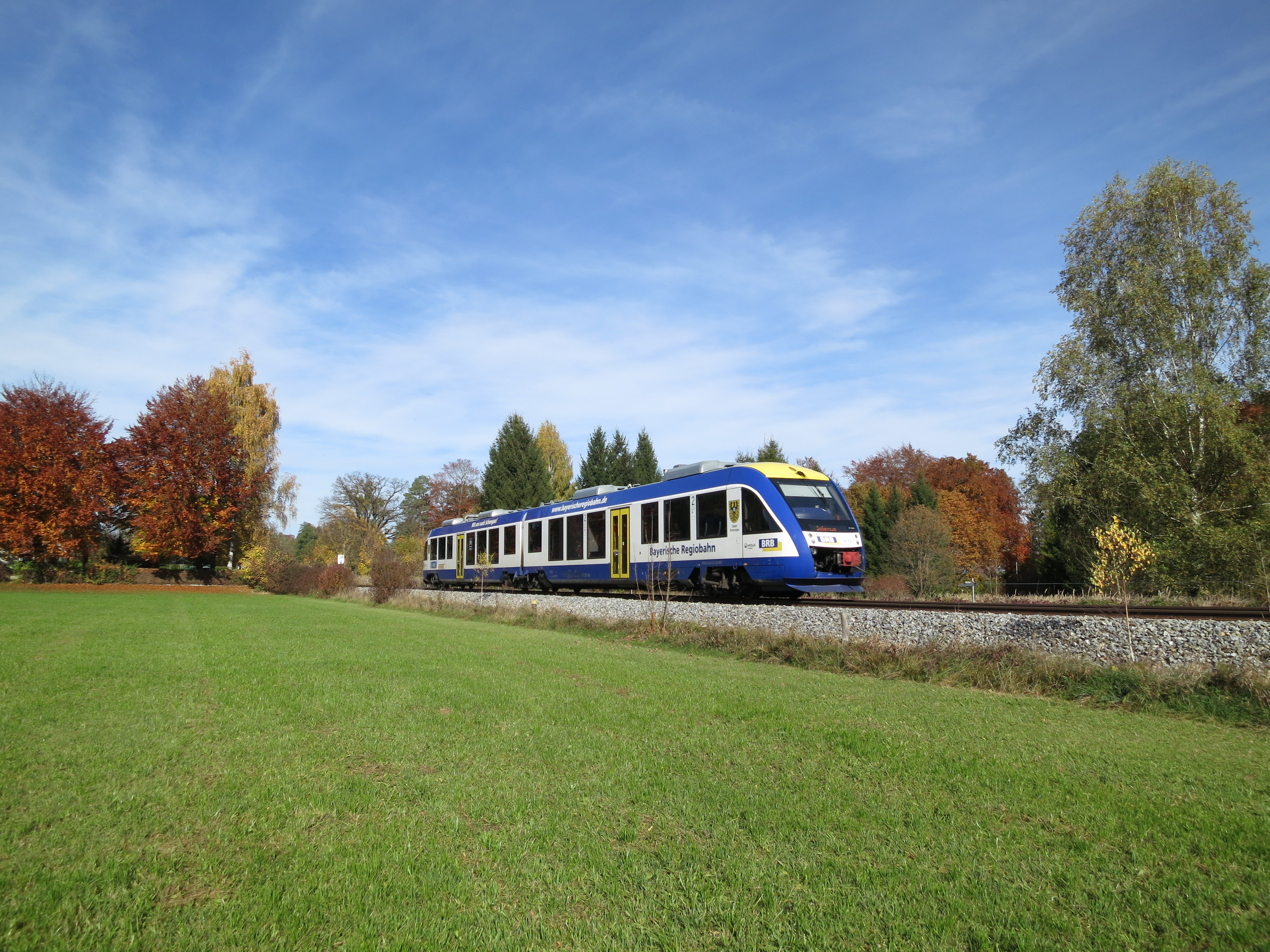 LINT-41-Triebwagen der BRB auf der Ammerseebahn südlich von Utting